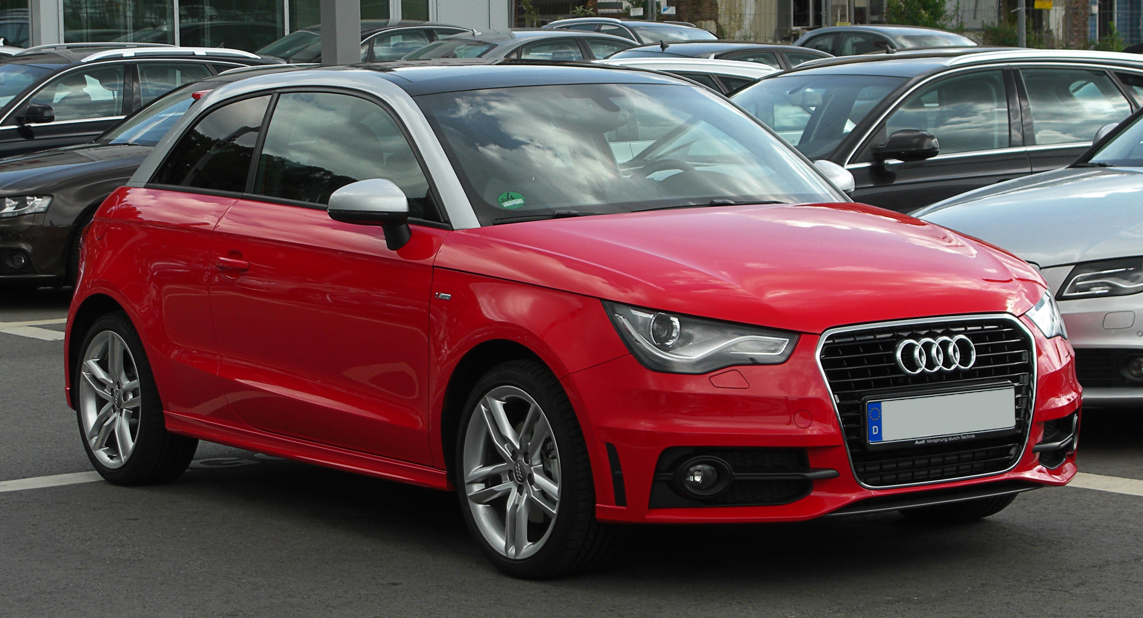 Audi A1 1.4 TFSI Ambition S-line